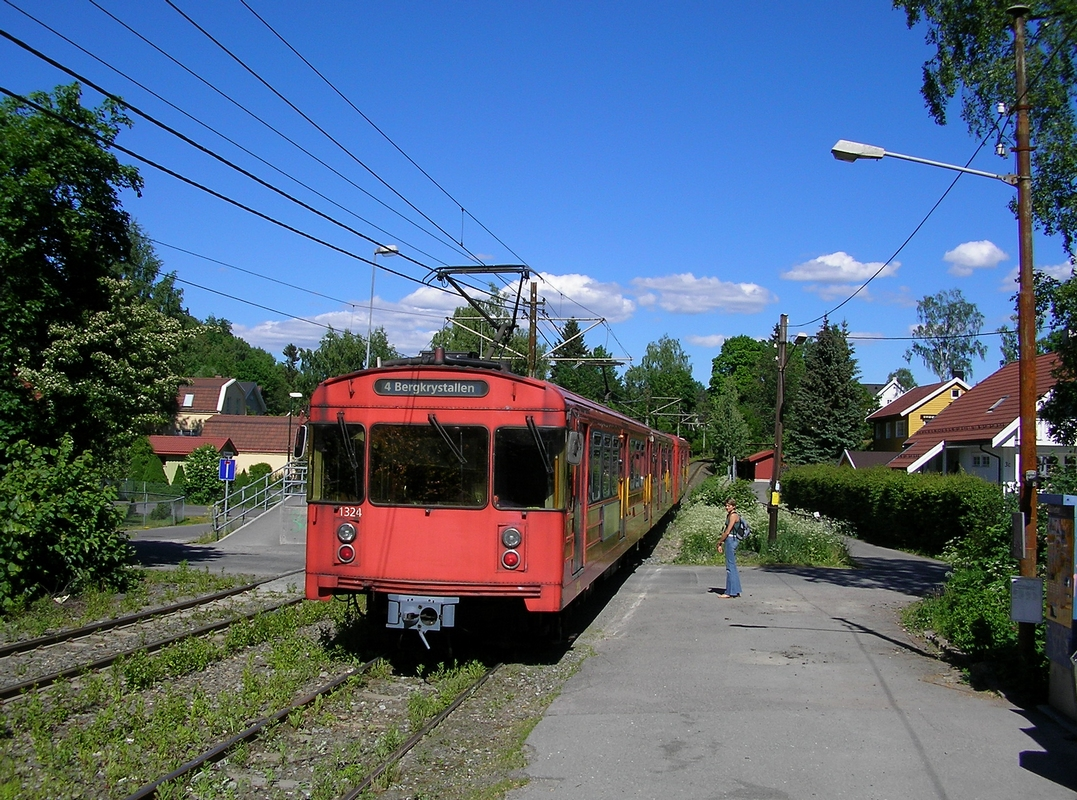 Et tog i 1300-serien ankommer Egne Hjem stasjon, en av Kolsåsbanens nedlagte stasjoner.